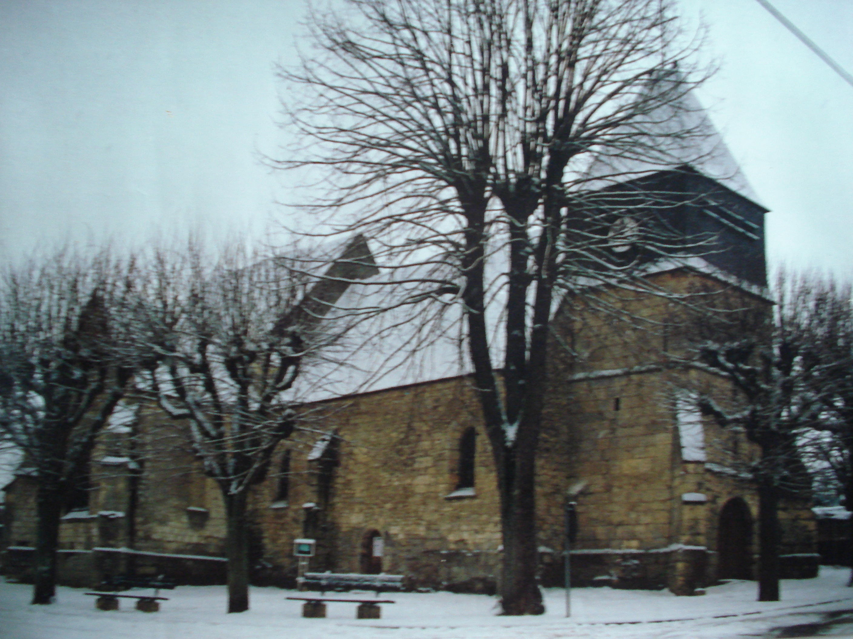 Eglise du XIIe, XVIe et XVIIe siècle